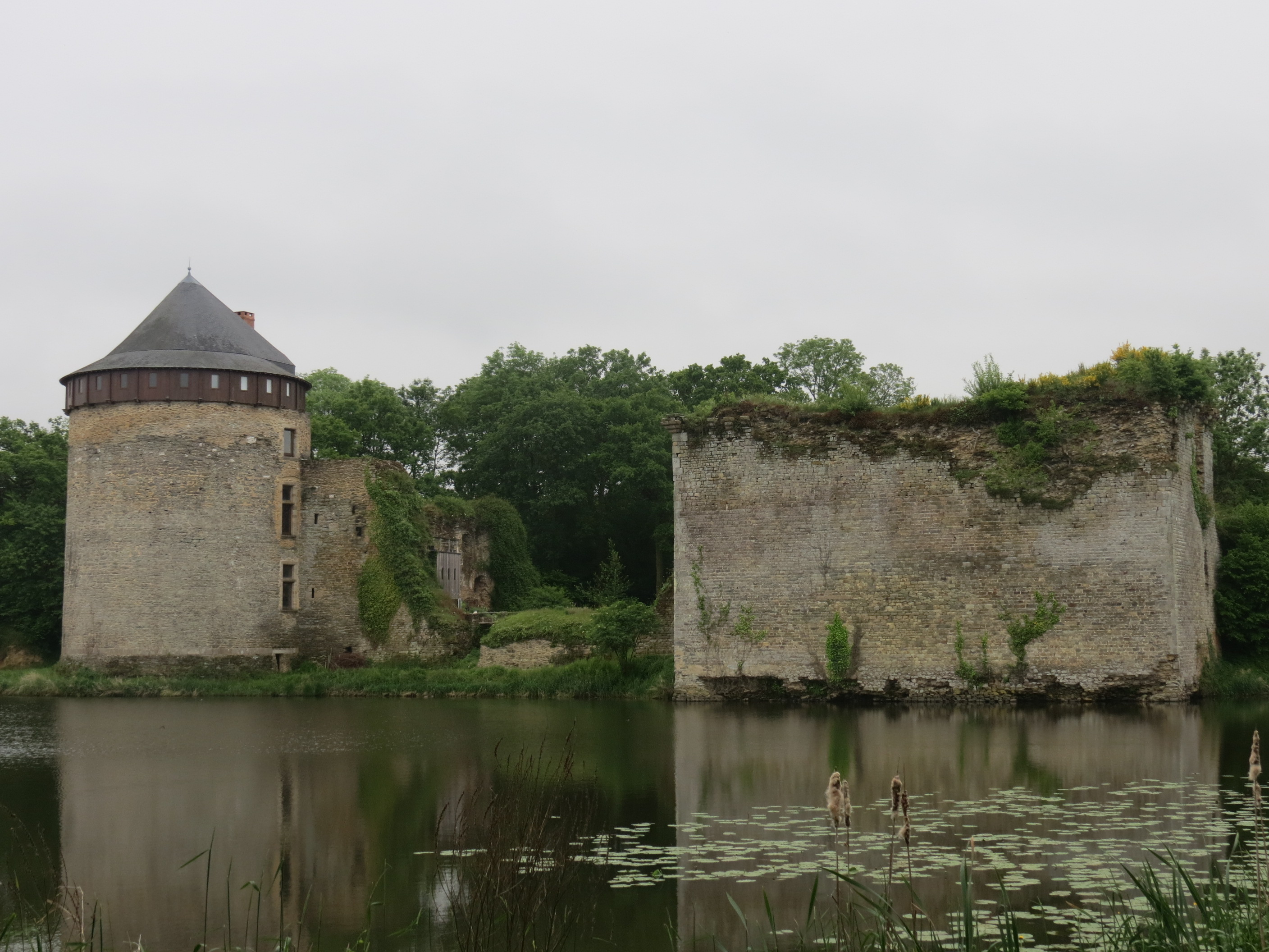 Montjean (53) - Château